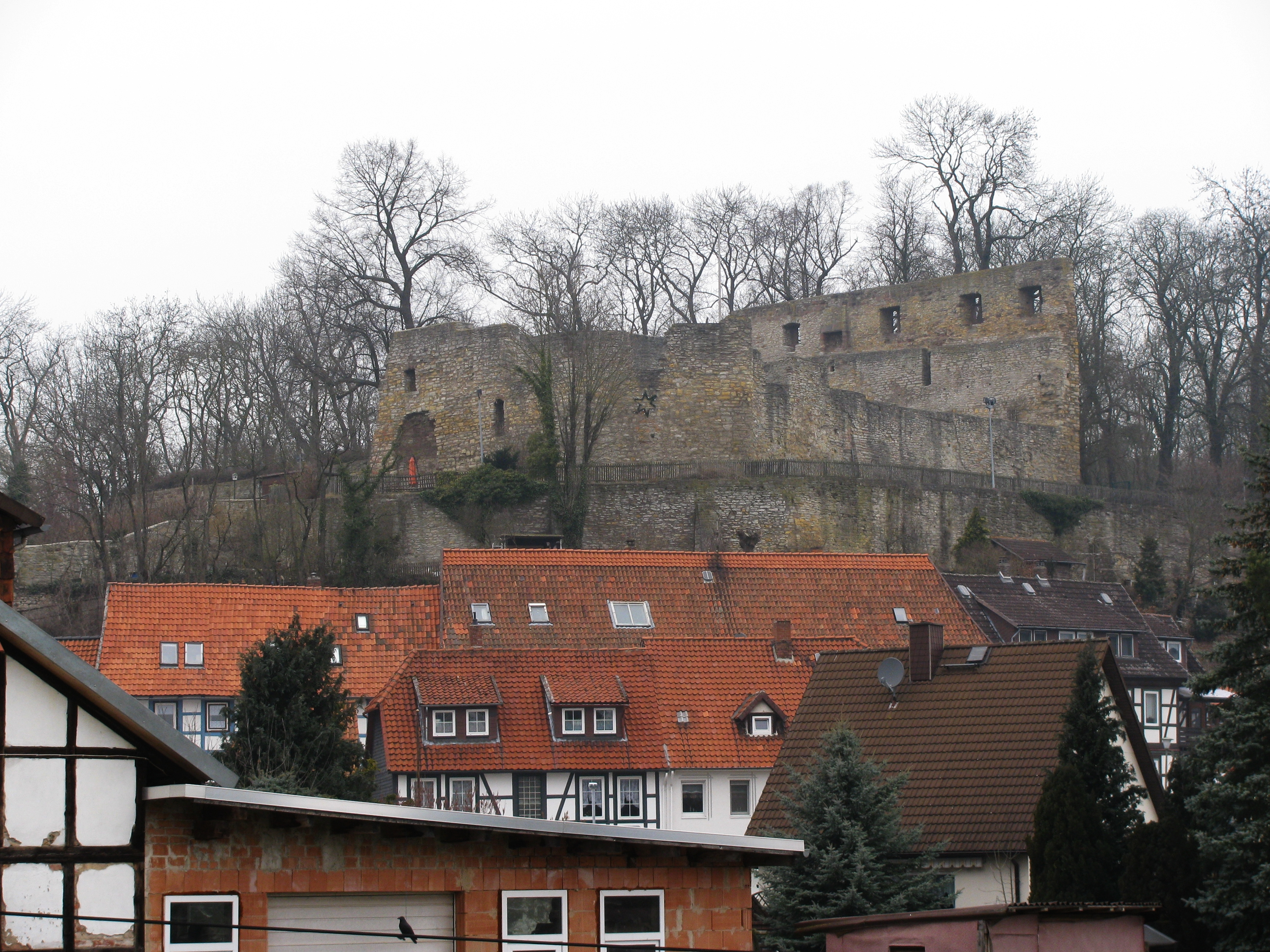 Burgruine Salzderhelden (auch "Heldenburg" genannt) bei Einbeck, Niedersachsen, Deutschland.